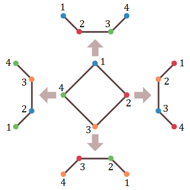 Formació de la següent iteració de la corba de Sierpinski